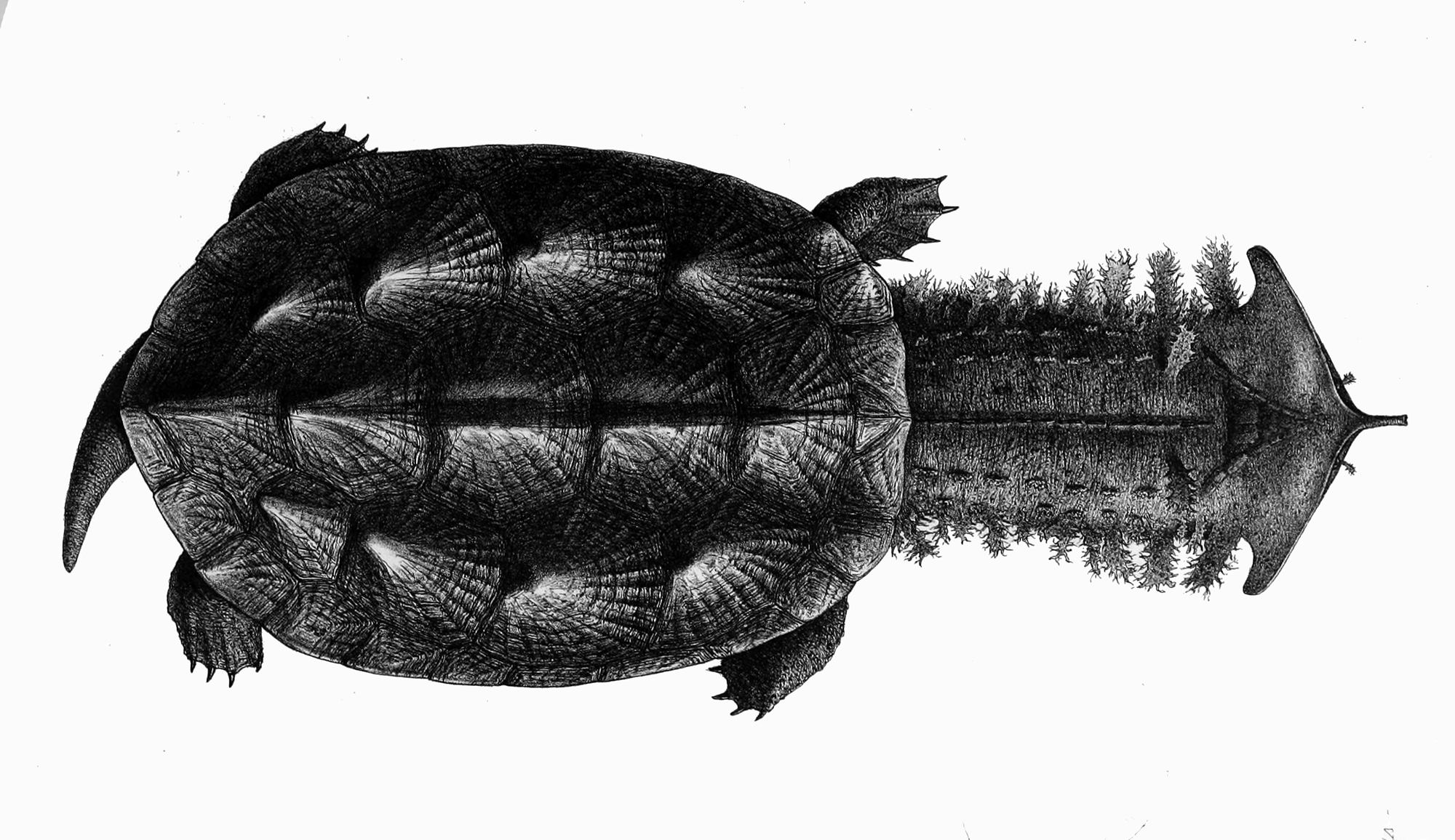 Chelus fimbriatus